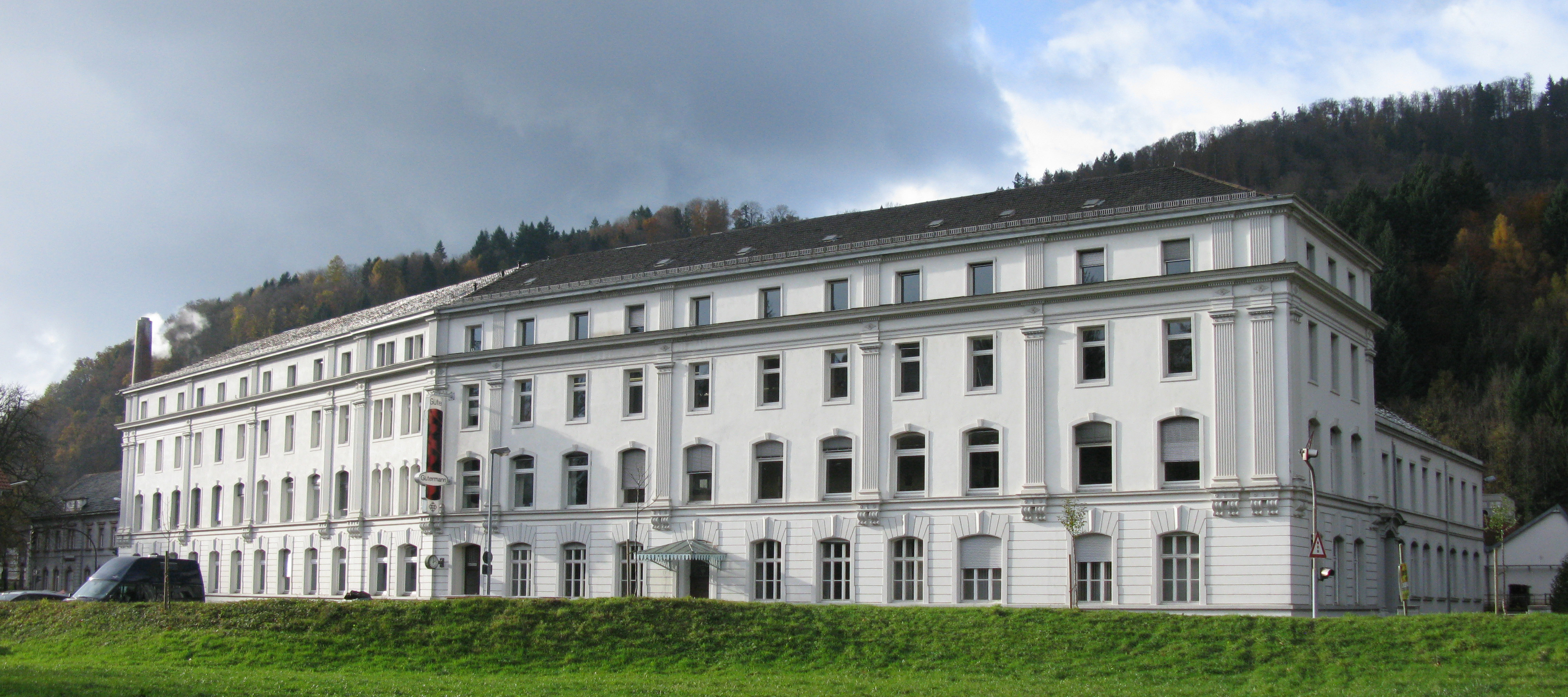 Werk der Firma Gütermann in Gutach